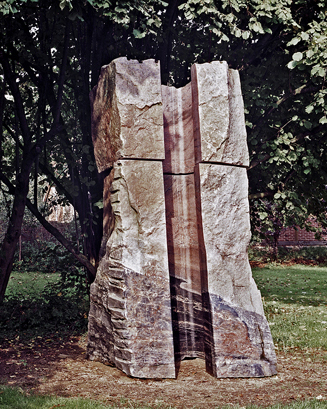 Quader mit Lichthof, 2000, Granit, Höhe 350cm, Standort „Skulpturengarten Damnatz an der Elbe“